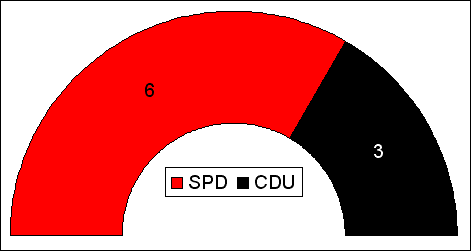 Sitzverteilung im Rat der Gemeinde Messenkamp in der Legislaturperiode 2006-2011